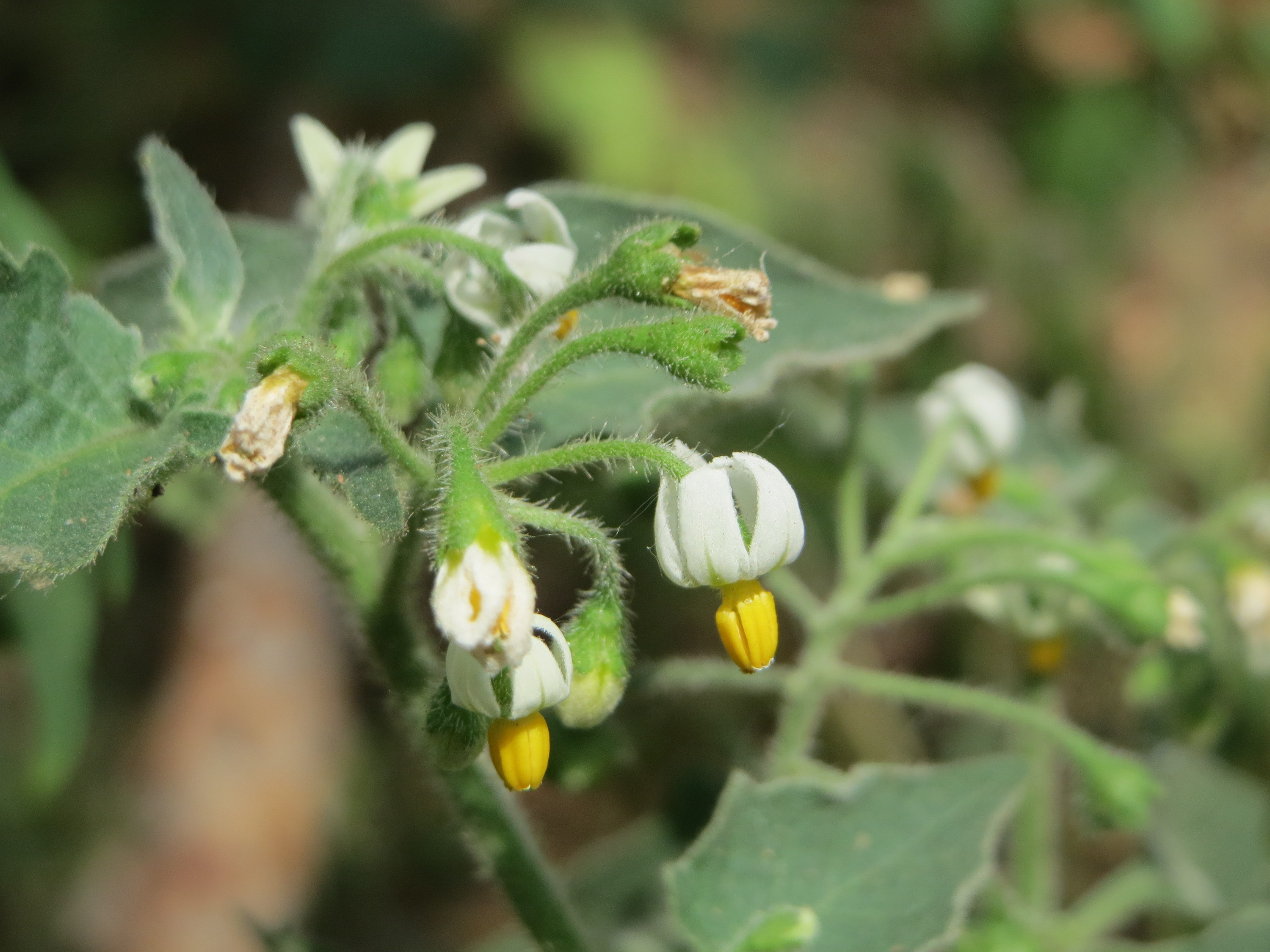 Schwarzer Nachtschatten (Solanum nigrum) am Hockenheimer Baggersee in der Schwetzinger Hardt